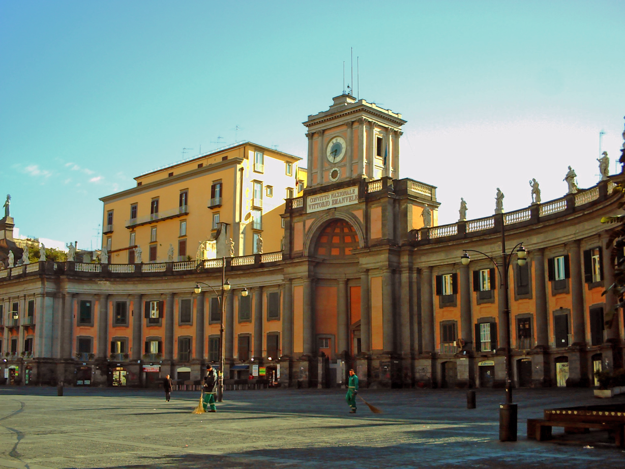 Foro Carolino; Piazza Dante (Napoli)